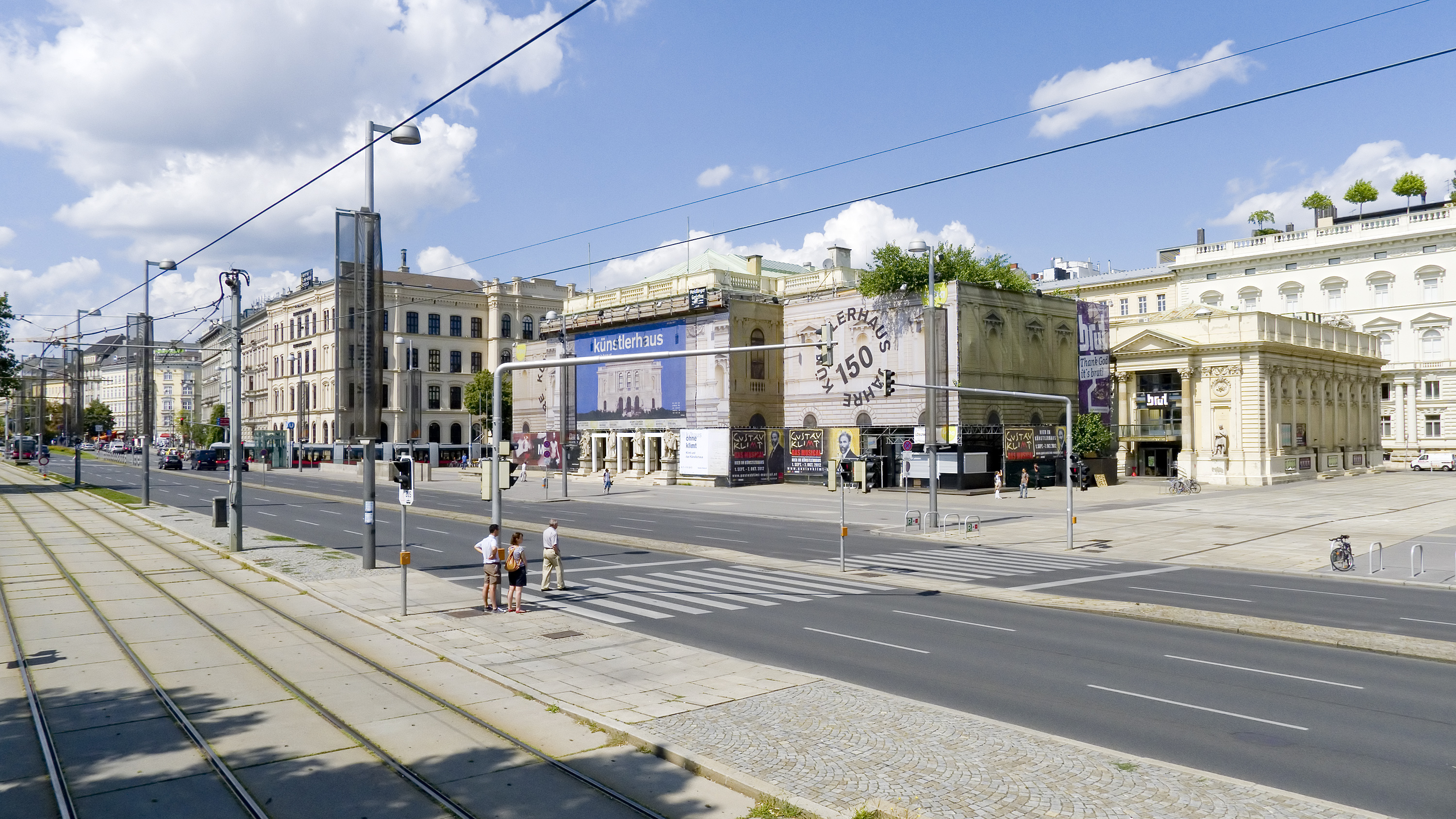 Karlsplatz in Wien 1 beim Musikvereinsplatz Richtung Nordwesten